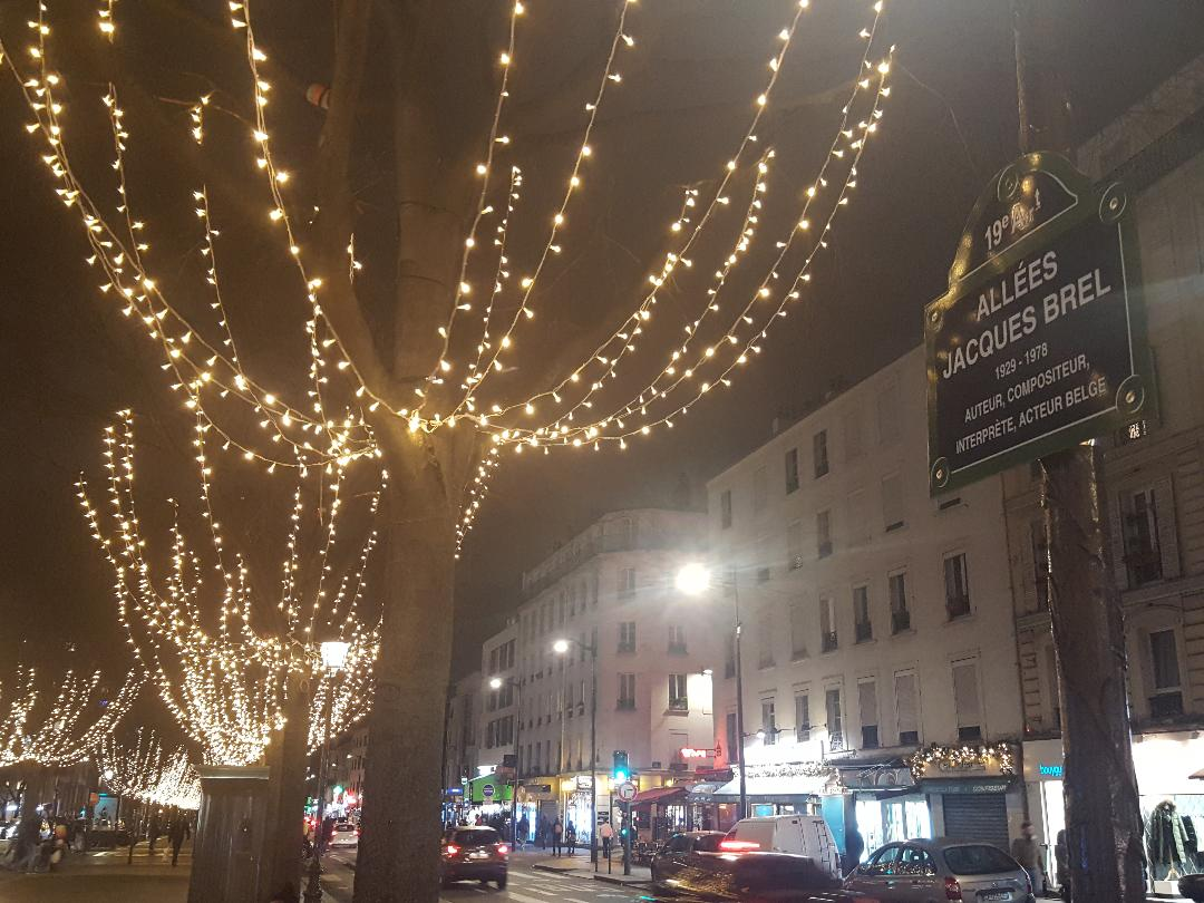 Illuminations de Noël 2019 des allées Jacques Brel. Le surnom de cette section de l'avenue de Flandre a pour surnom son surnom "Les Champs-Elysées de l'Est parisien".